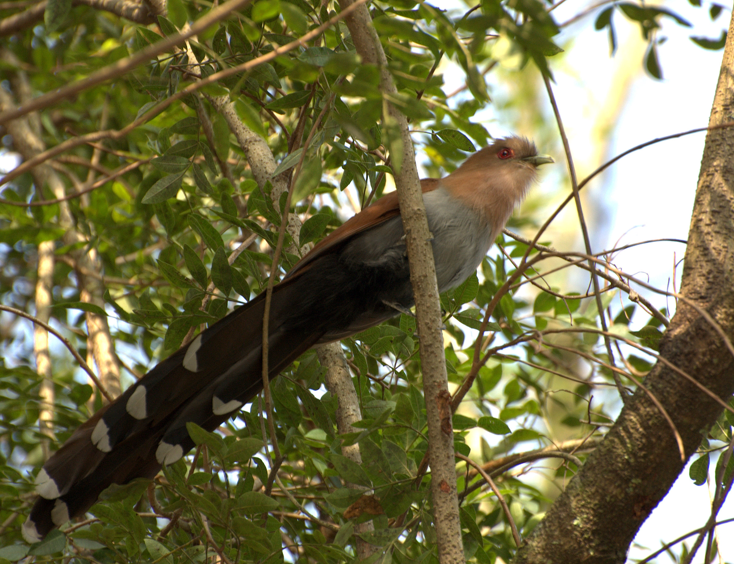 Squirrel Cuckoo Piaya cayana, Horto Florestal de São Paulo